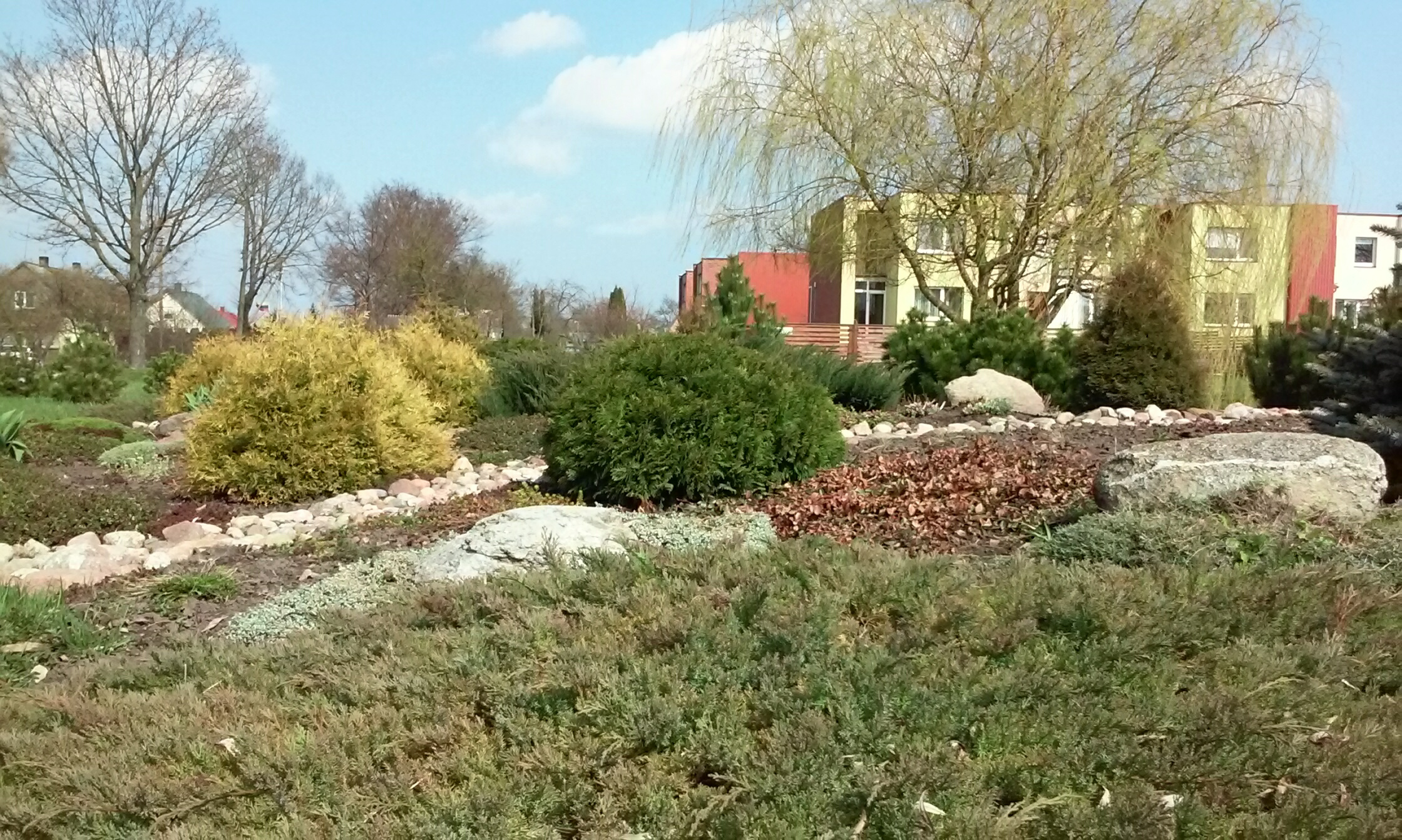 Vienas iš Baraginės lankytinų objektų (gėlynas bei netoli esantys objektai)